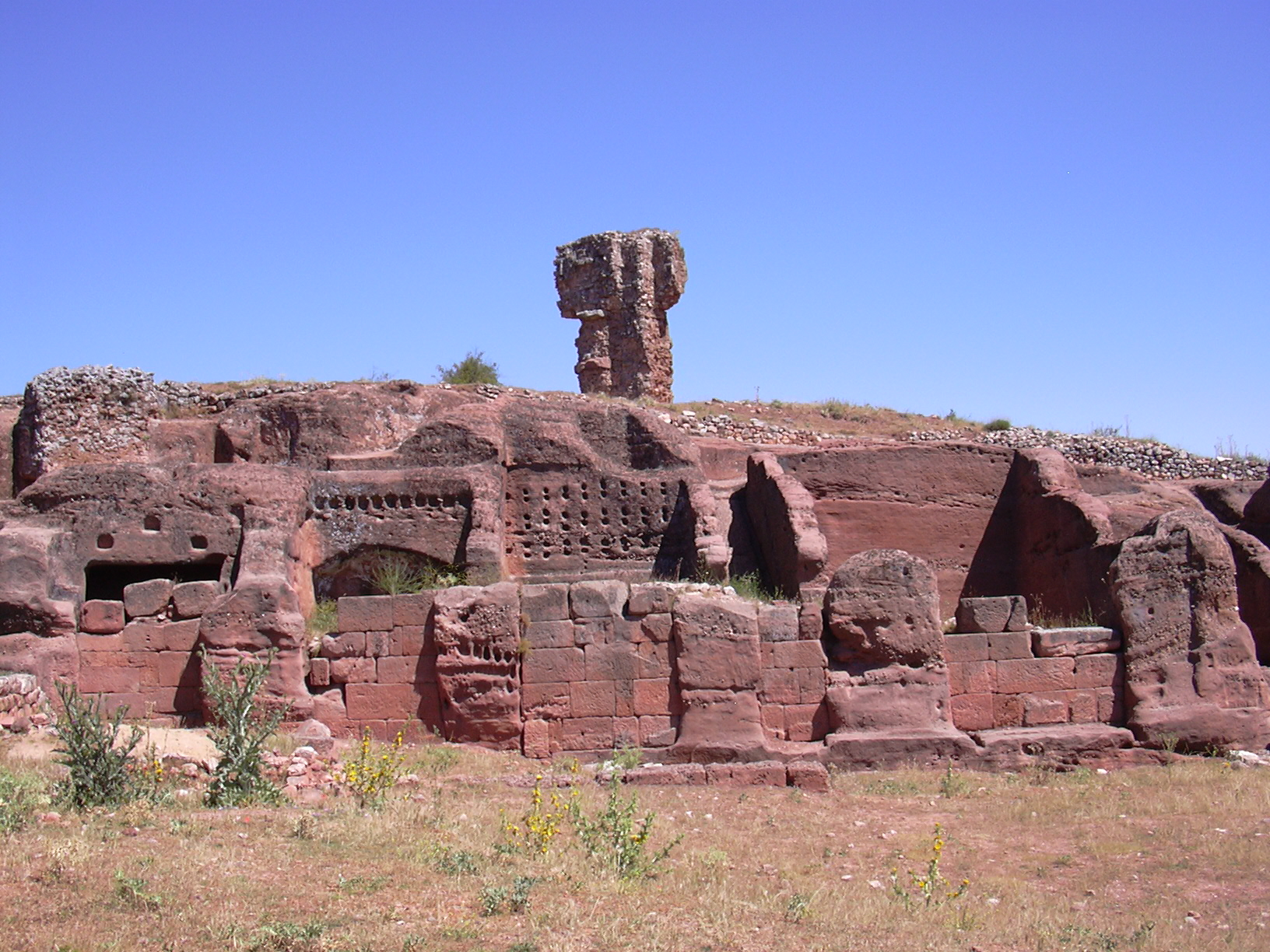 Yacimiento arqueológico de Tiermes